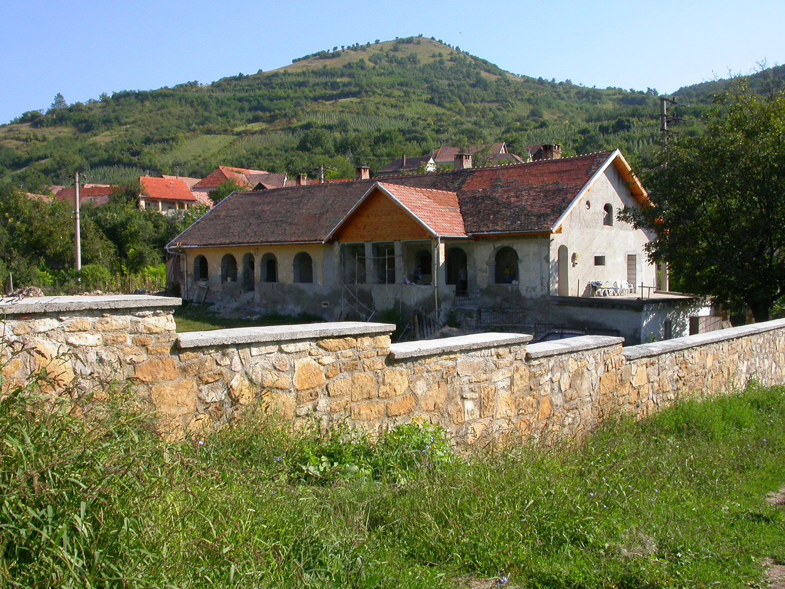 Ansamblul conacului Teleky, sec. XVIII